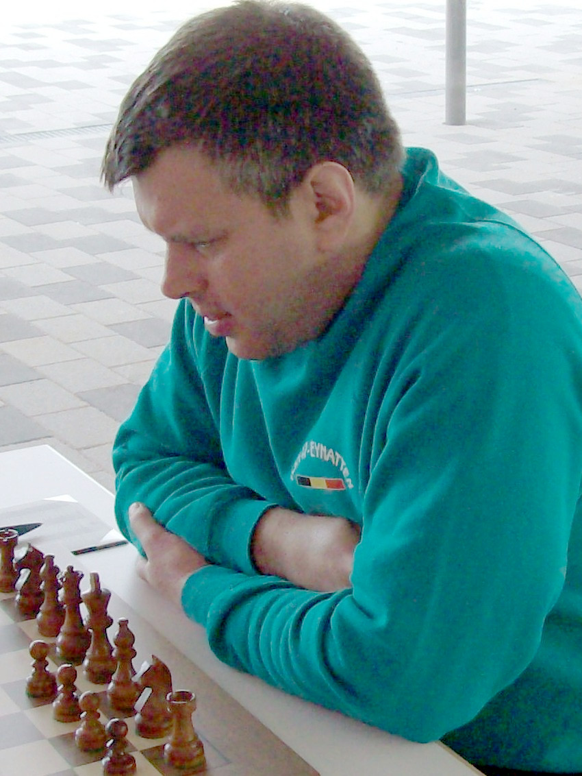 Igor Khenkin, chess grandmaster